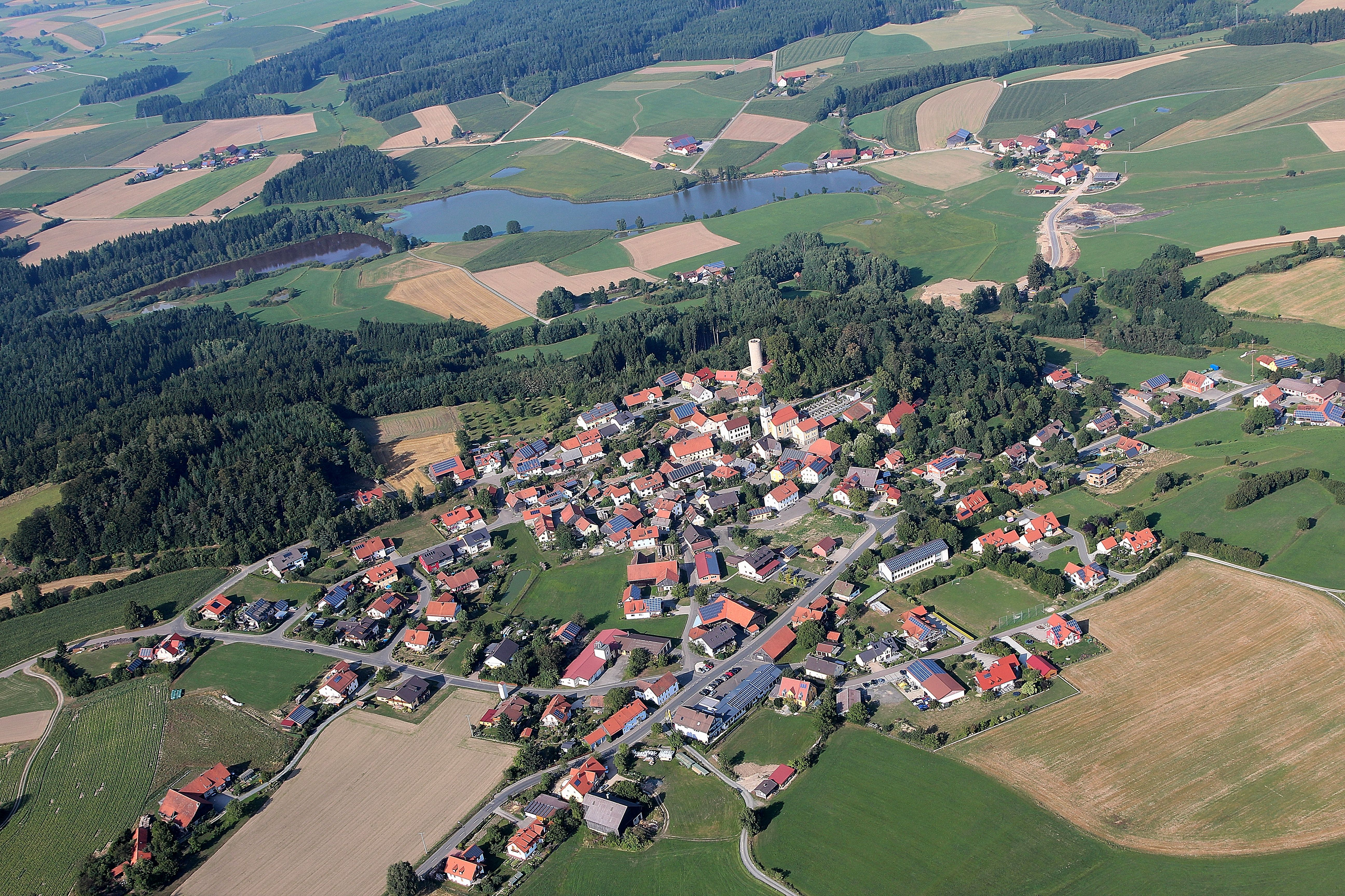 Thanstein, Landkreis Schwandorf, Oberpfalz, Bayern